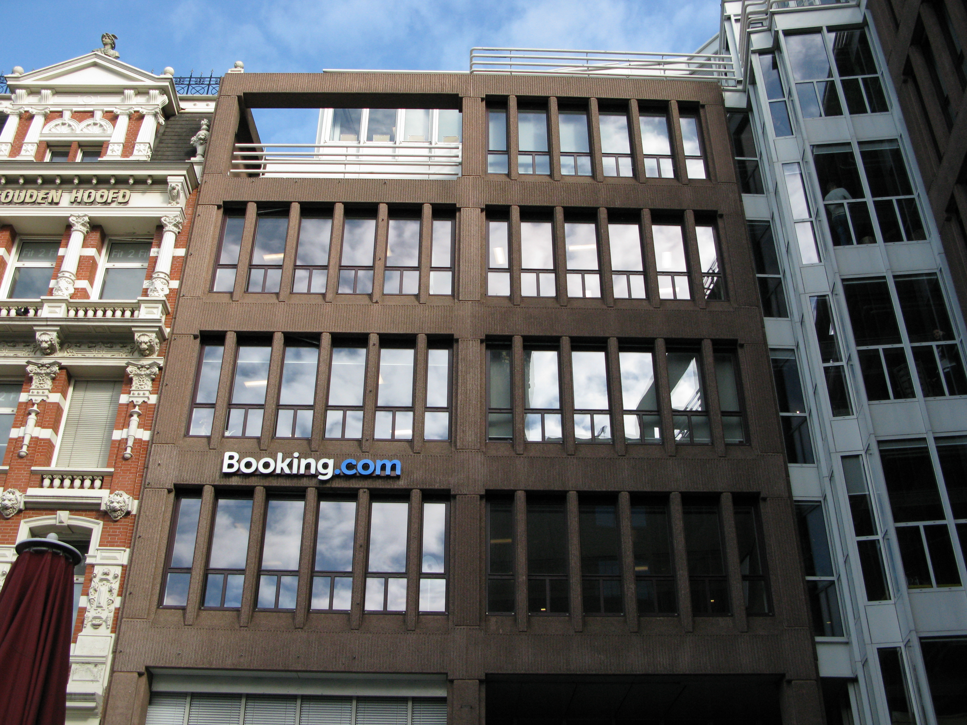 Headquarters Amsterdam（Annex）